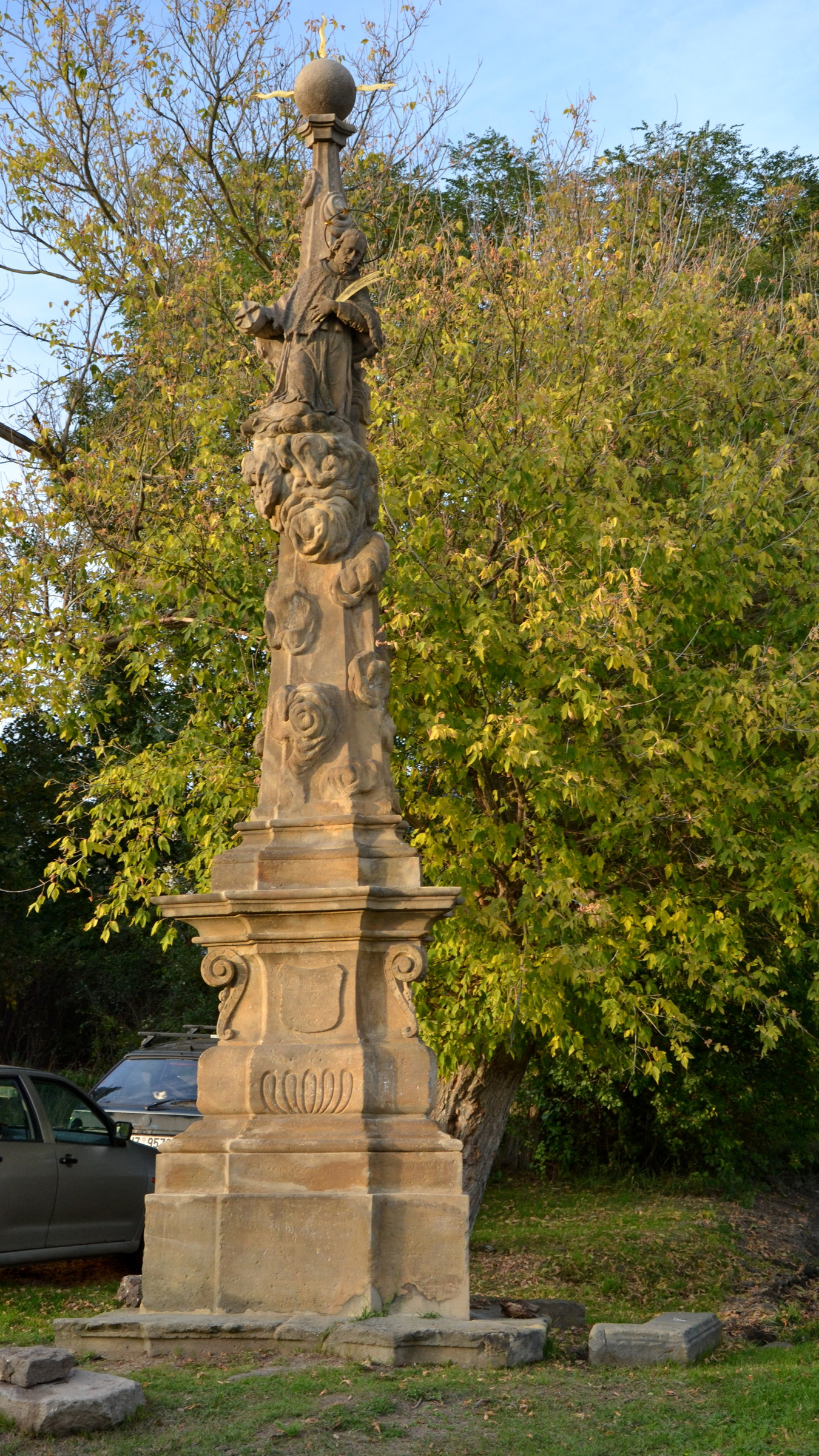 Socha sv. Jana Nepomuckého (Škrle), Škrle